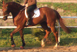 anglo arabo sardo lavoro in piano